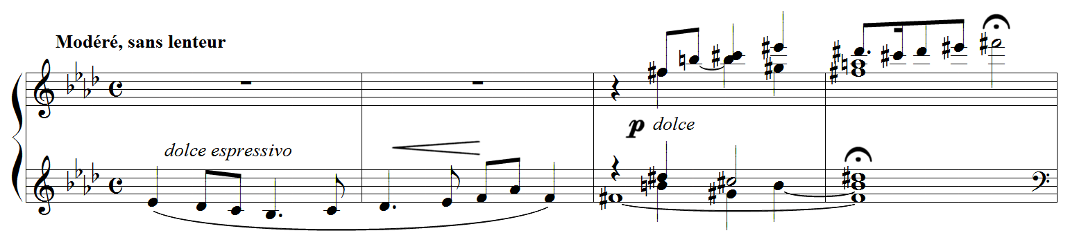 Paul Ladmirault - Dominical, 4e mouvement "Dans un beau château", premières mesures